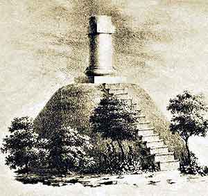 Монумент персидского принца (вершина Машука)